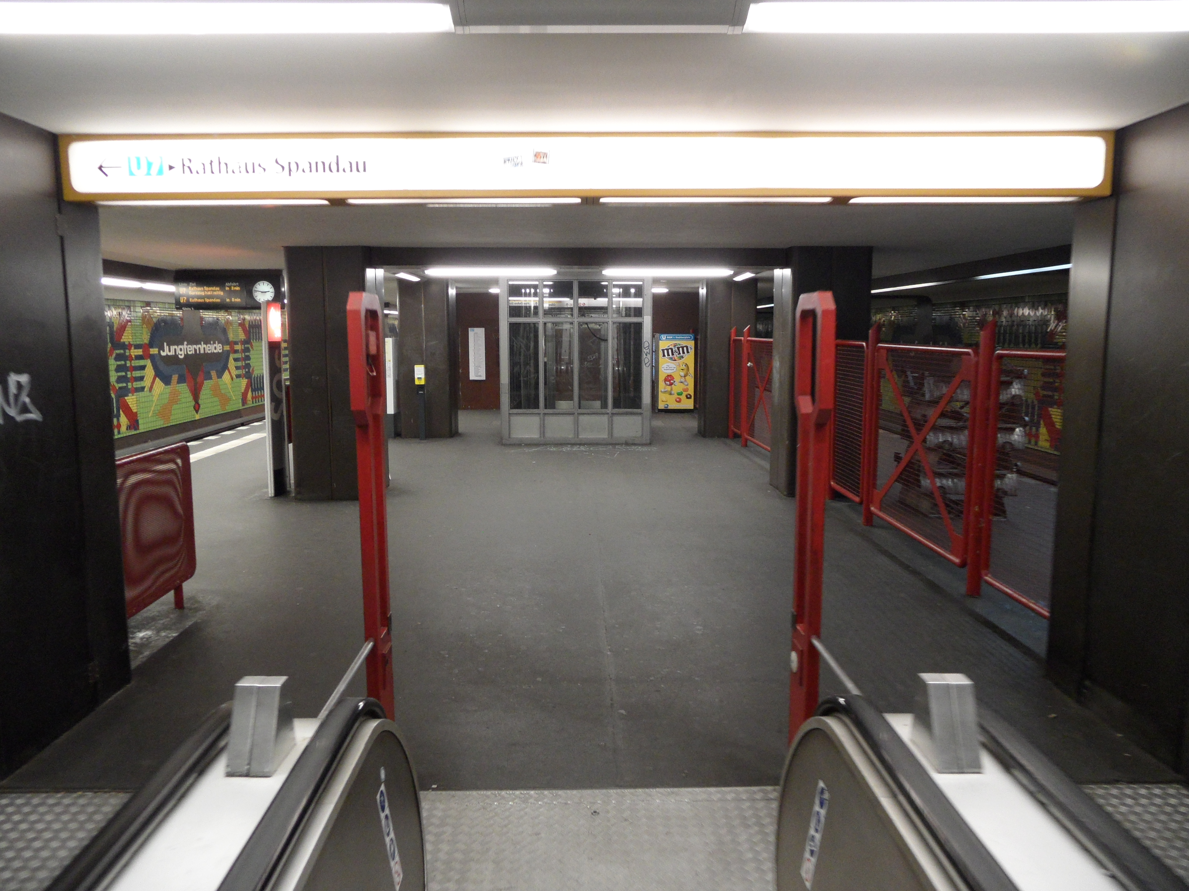 Berlin - U-Bahnhof Jungfernheide - Linie U7